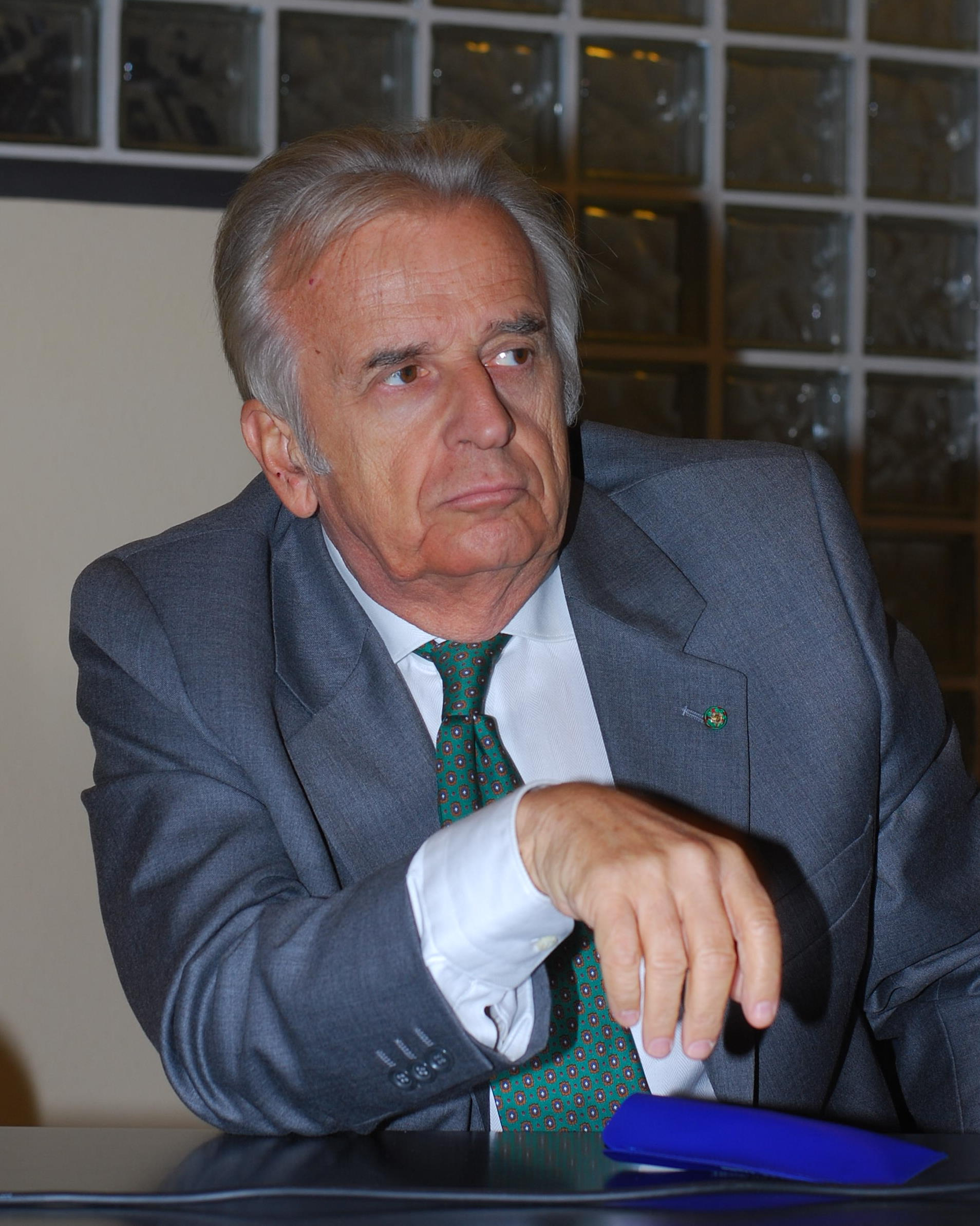 Antonio Avati, sceneggiatore e produttore cinematografico italiano